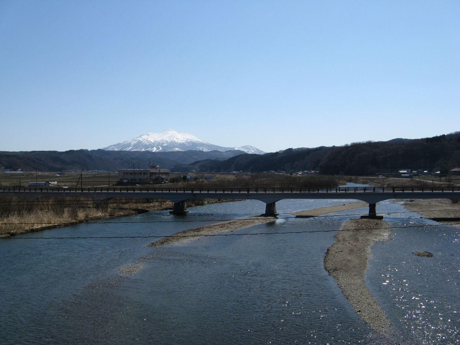 赤石川 五能線から南東望 背後は岩木山